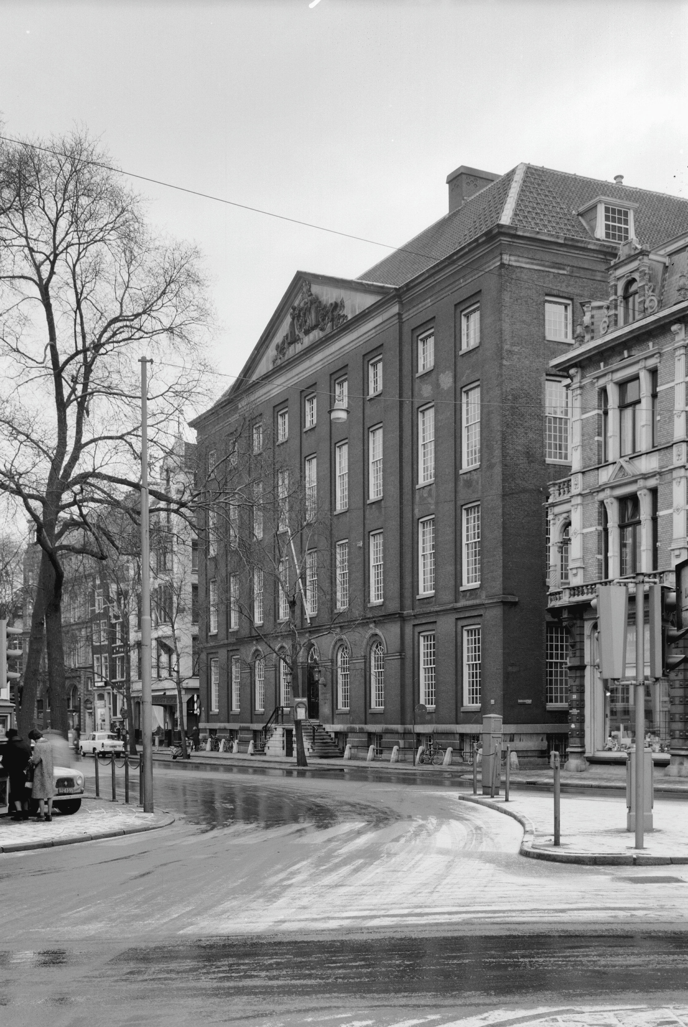 Maagdenhuis: Spui, aanzicht